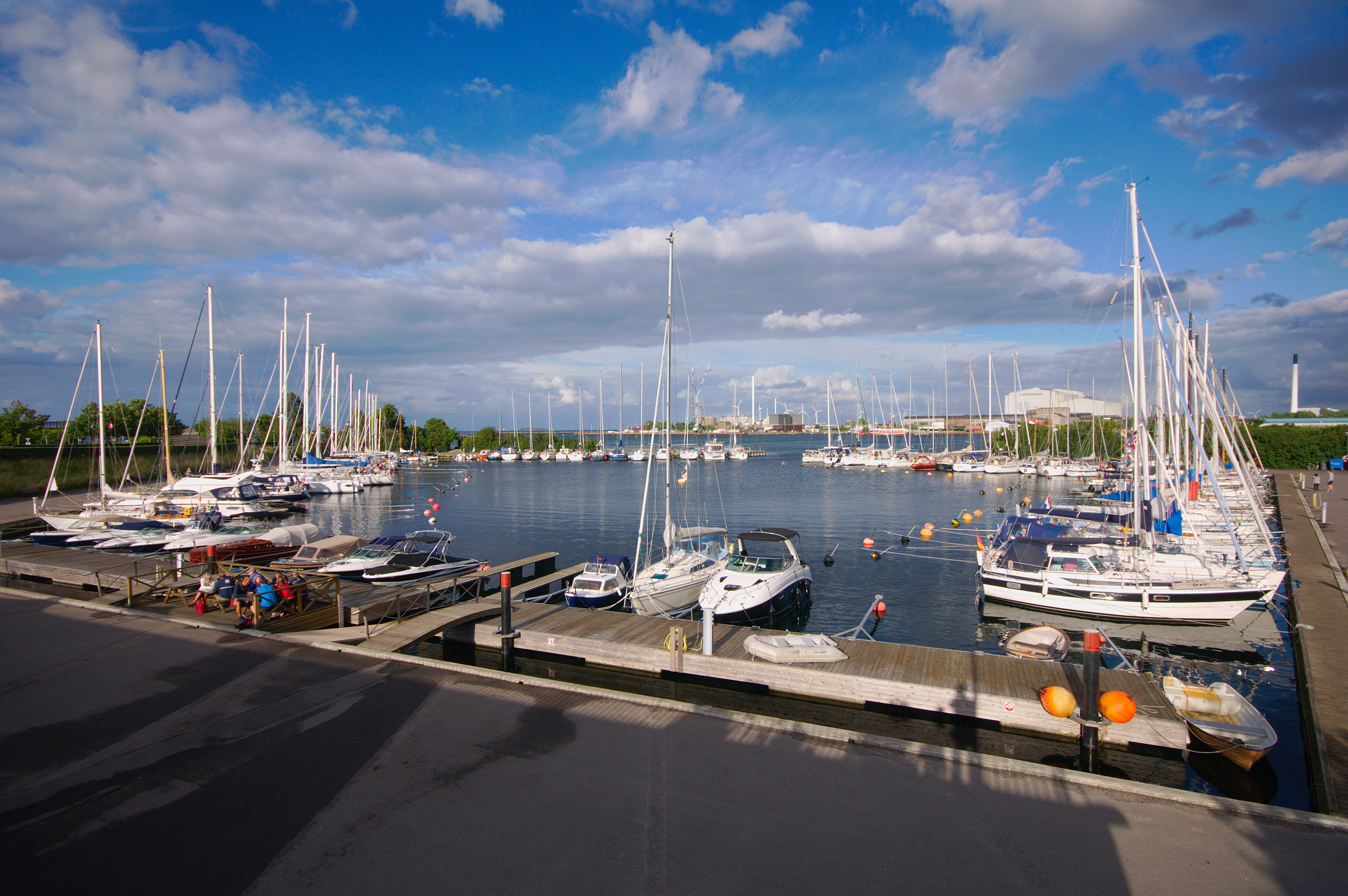 Langelinie Lystbådehavn, København